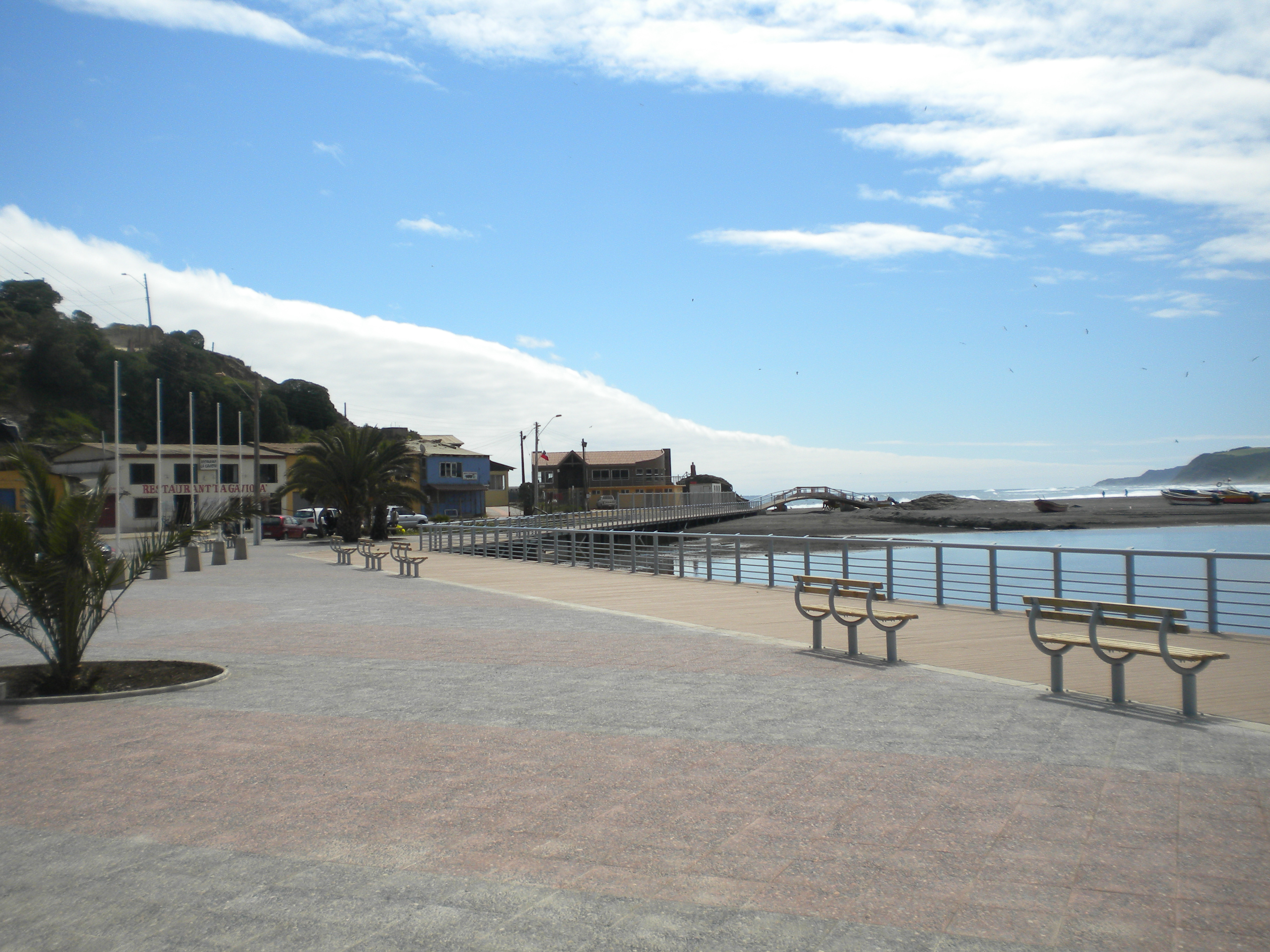 Paseo costero Bucalemu